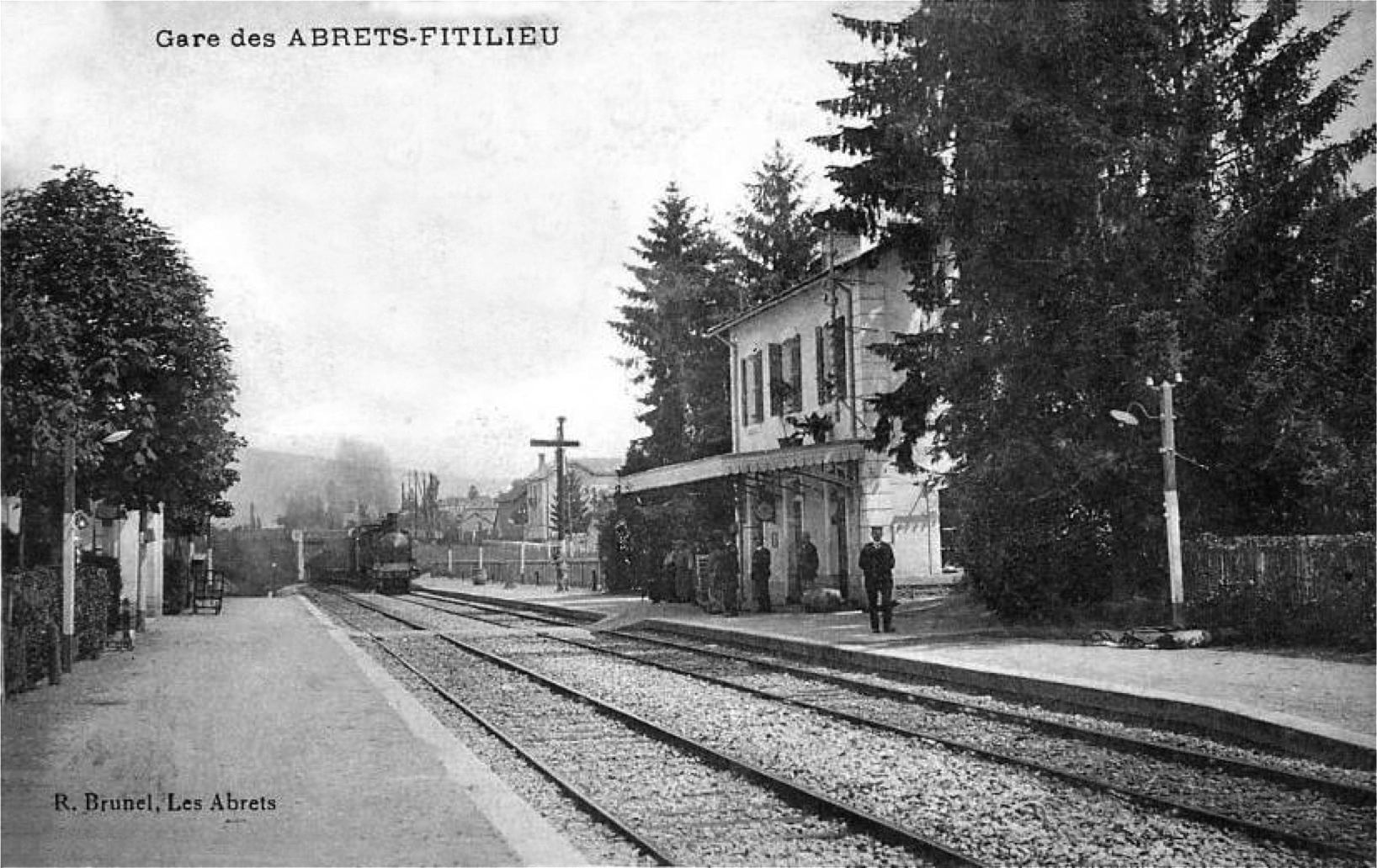 Intérieur de la gare des Abrets-Fitilieu au début des années 1900. Les voies, les quais, le bâtiment voyageurs et une locomotive à vapeur arrivant en gare.